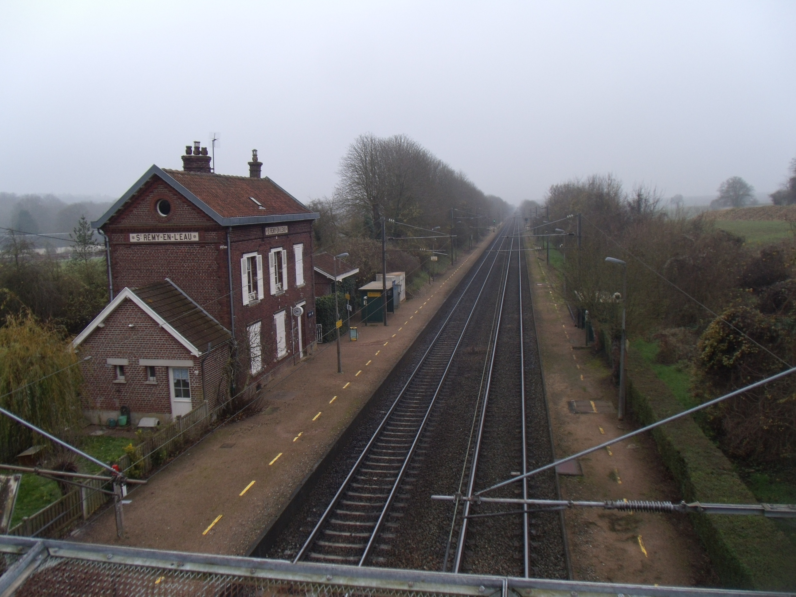 La gare vue du pont